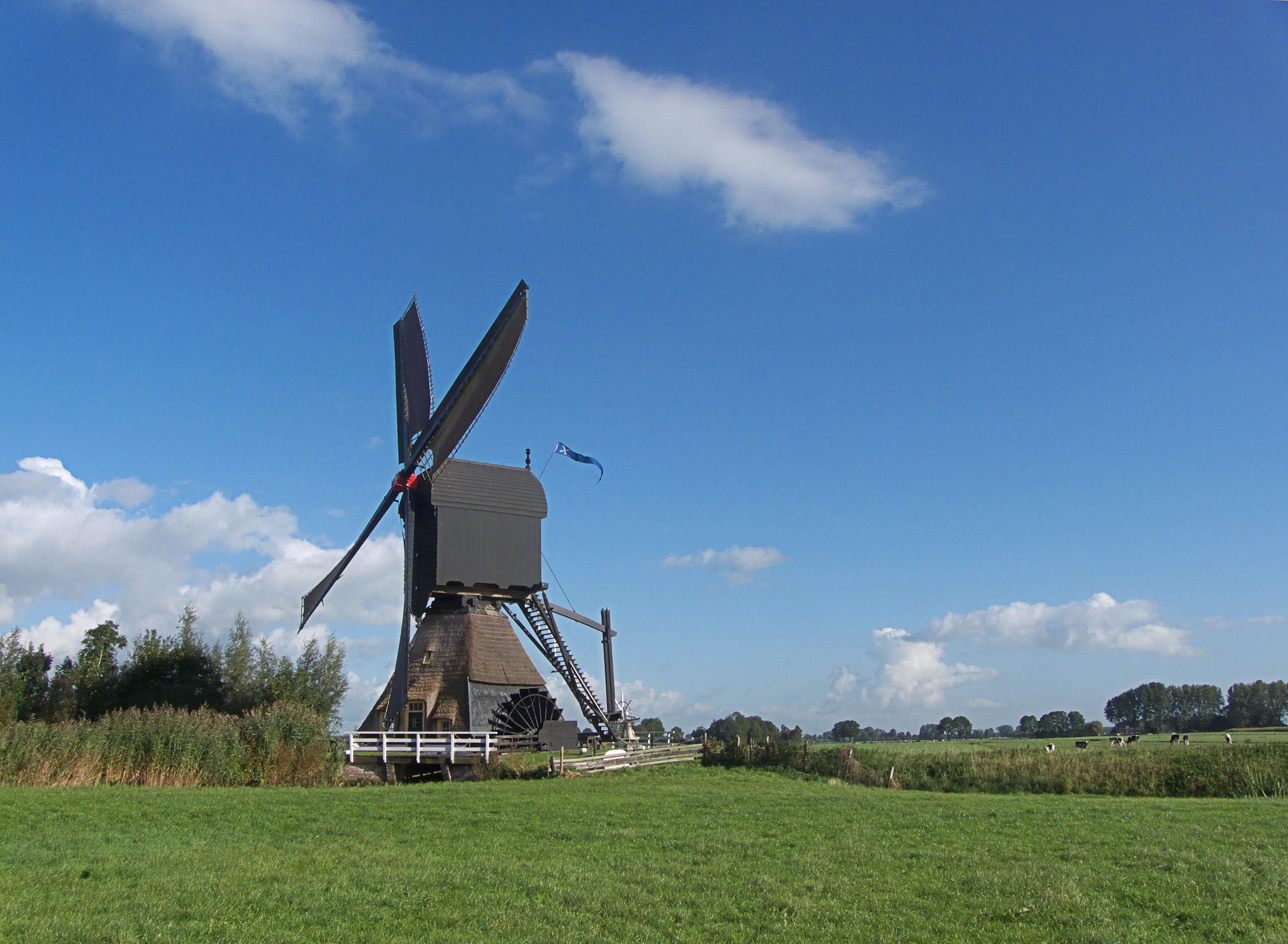 Stijve Molen, Meerkerk, Nederland